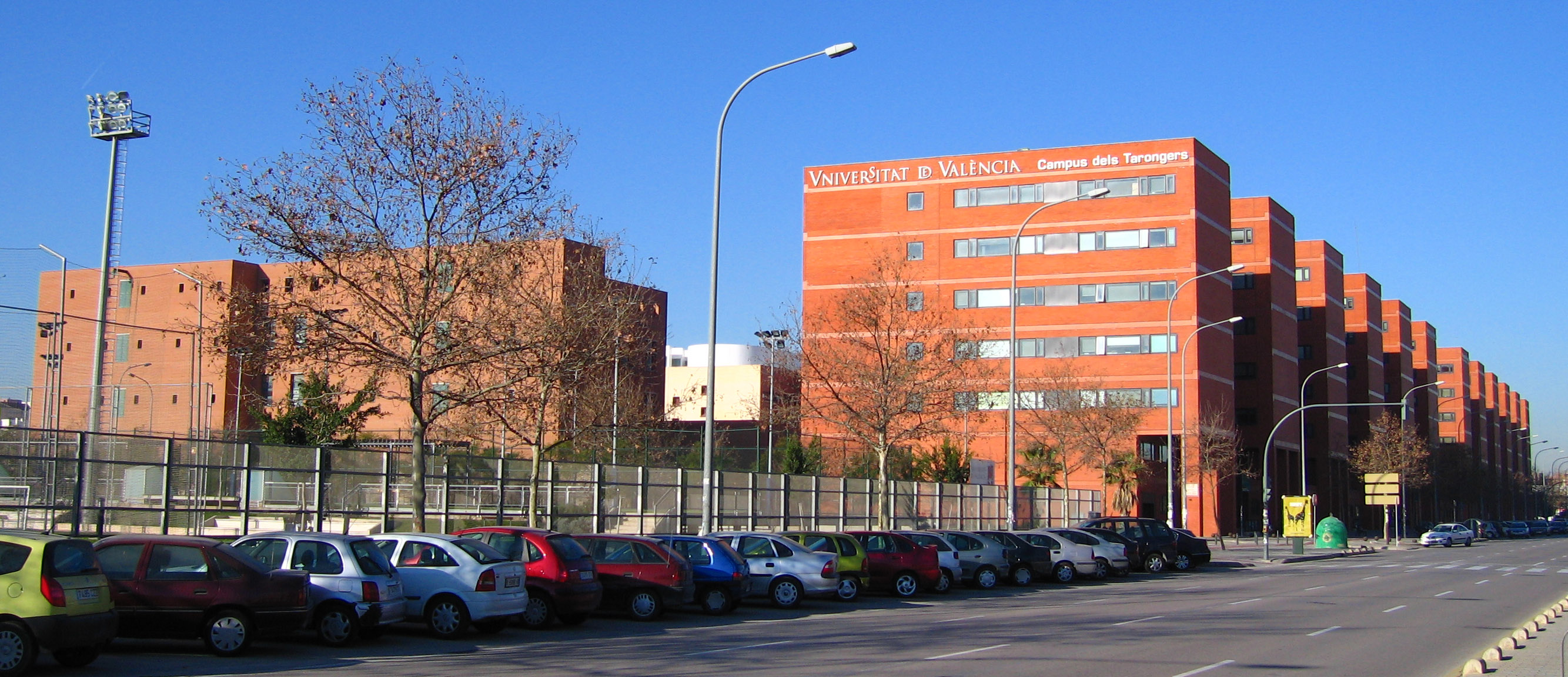 Campus dels Tarongers (UVEG) València